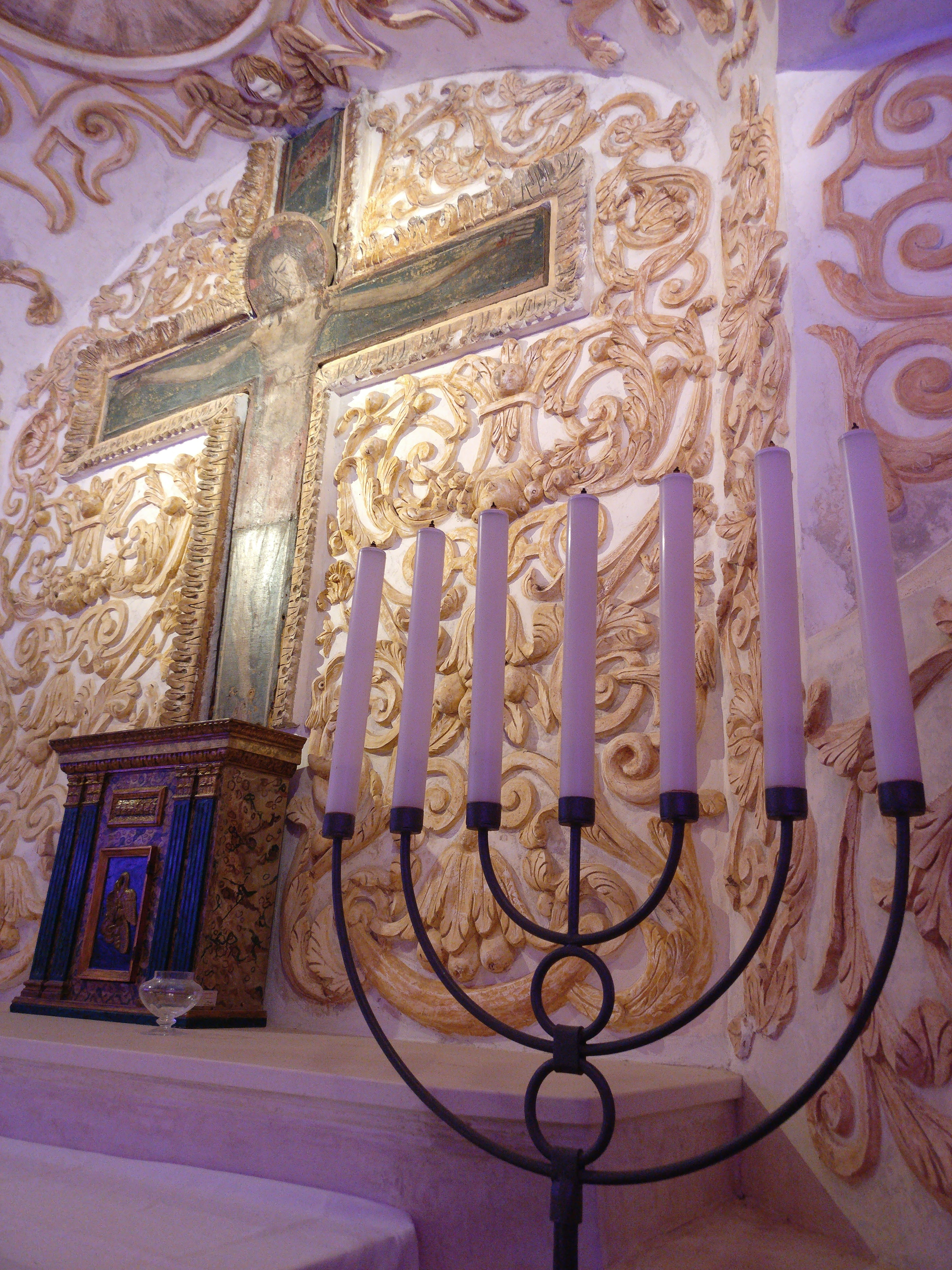 Chiesa Santa Maria Maggiore This is a photo of a monument which is part of cultural heritage of Italy.